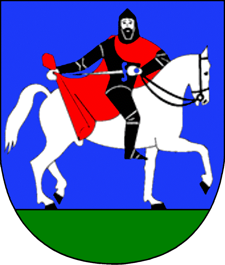 Wappen der Gemeinde Wängle in Österreich